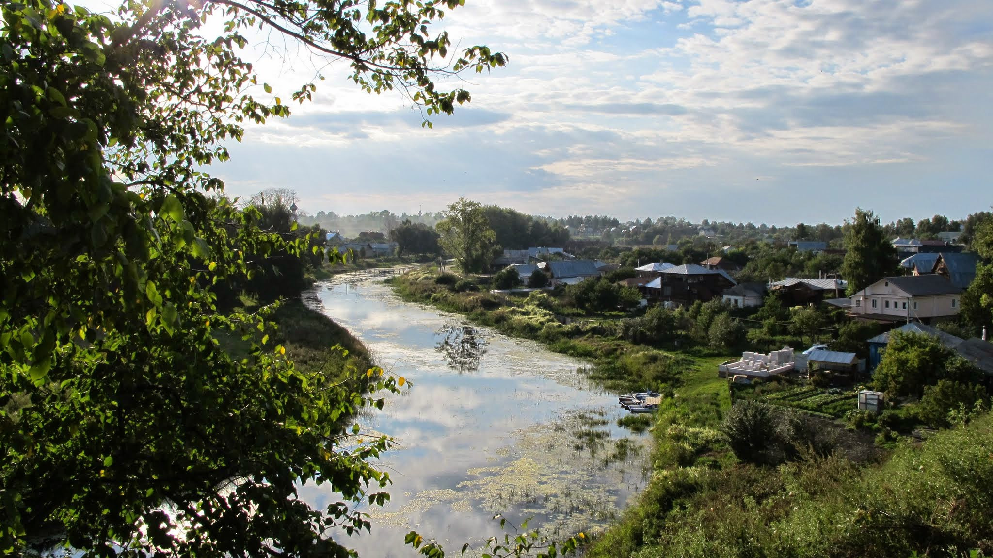 Suzdal, Vladimir Oblast, Russia